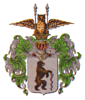 Vaakuna